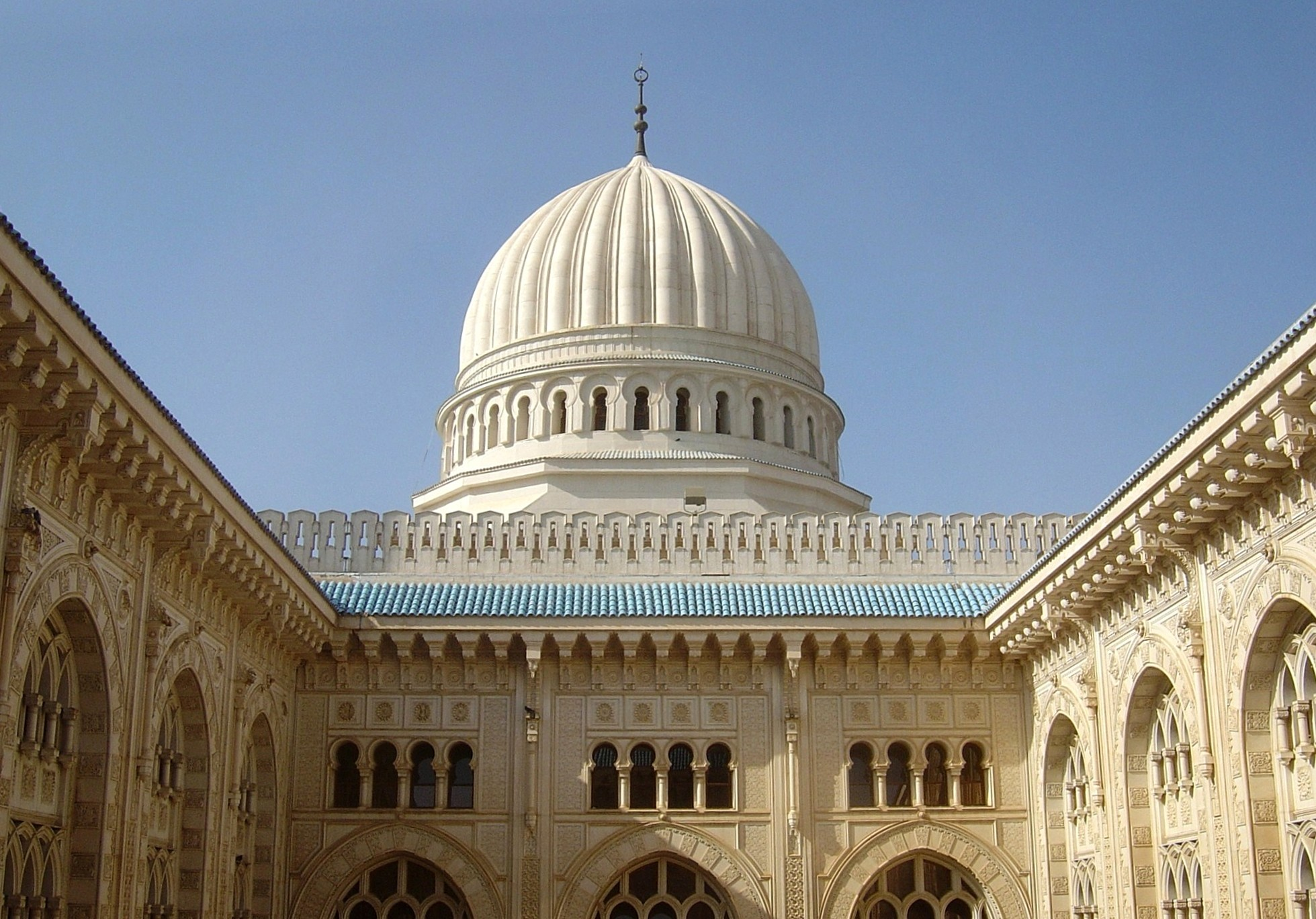 Patio de la mosquée Émir Abdelkader avec vue sur le dôme (Constantine, Algérie).